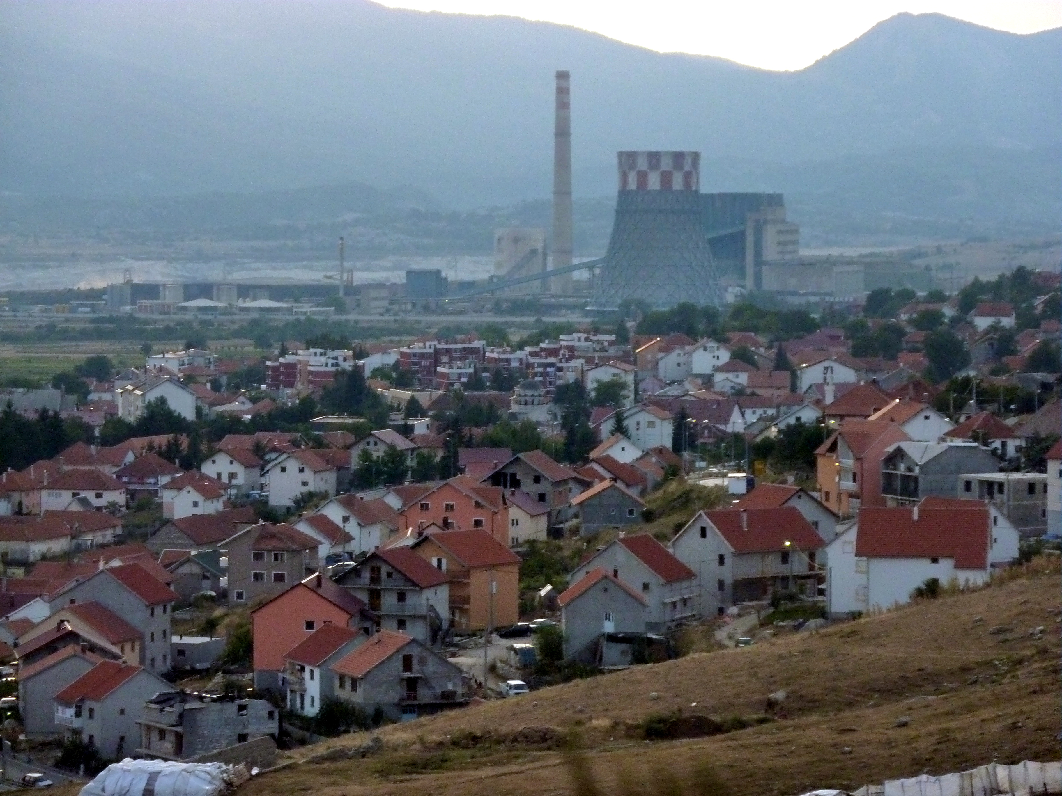 Gacko, BiH.